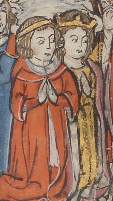 Mariage de Conrad de Montferrat et d'Isabelle de Jérusalem